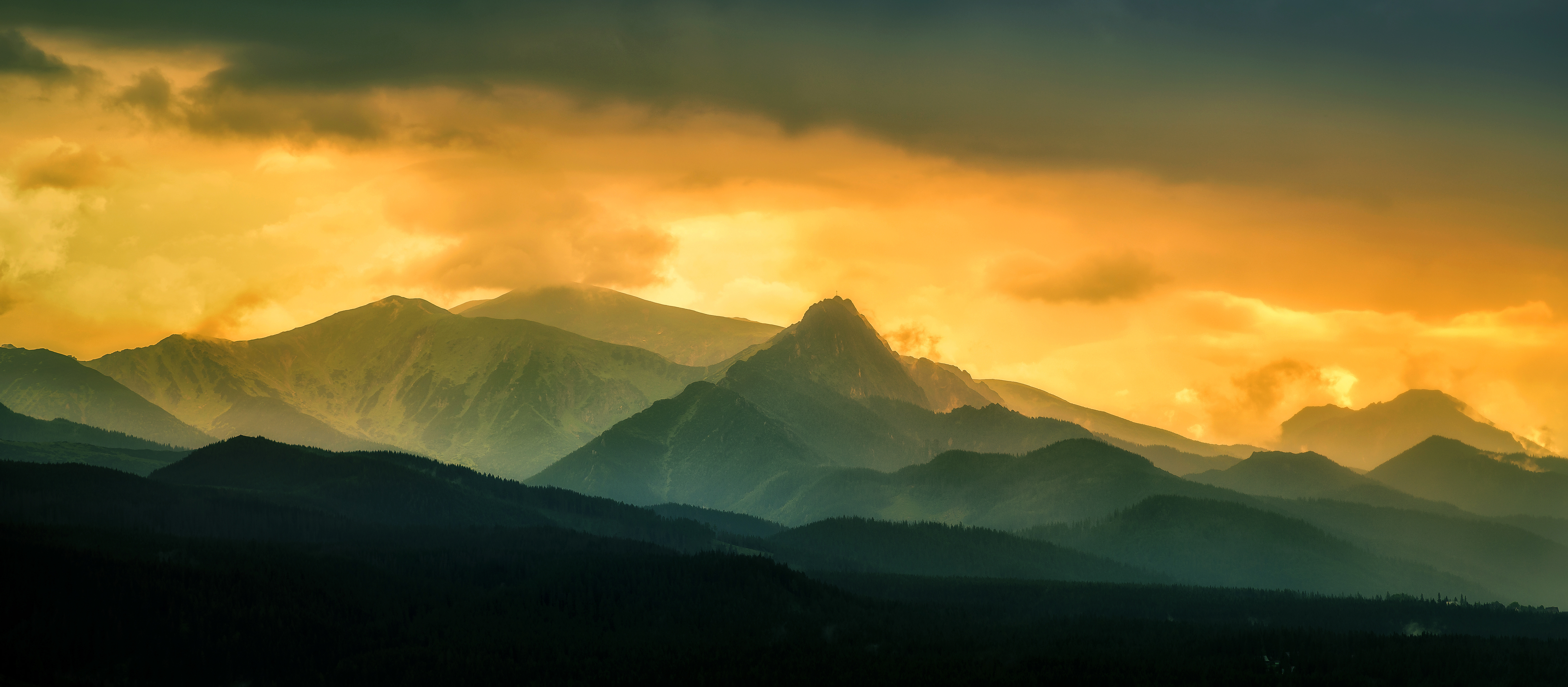 Obszar specjalnej ochrony ptaków Tatry. This is a photography of Natura 2000 protected area with ID PLC120001